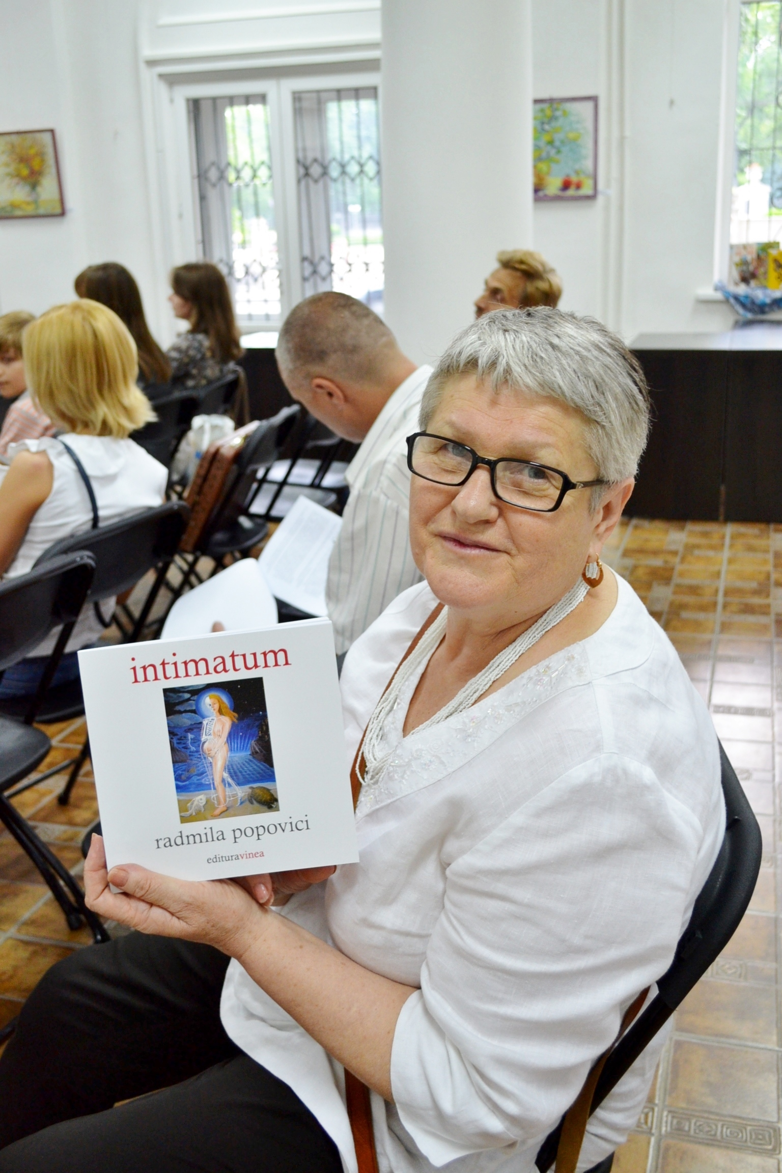 Lansarea cărții „intimatum”, de Radmila Popovici. Biblioteca Centrală, 11.06.2014.